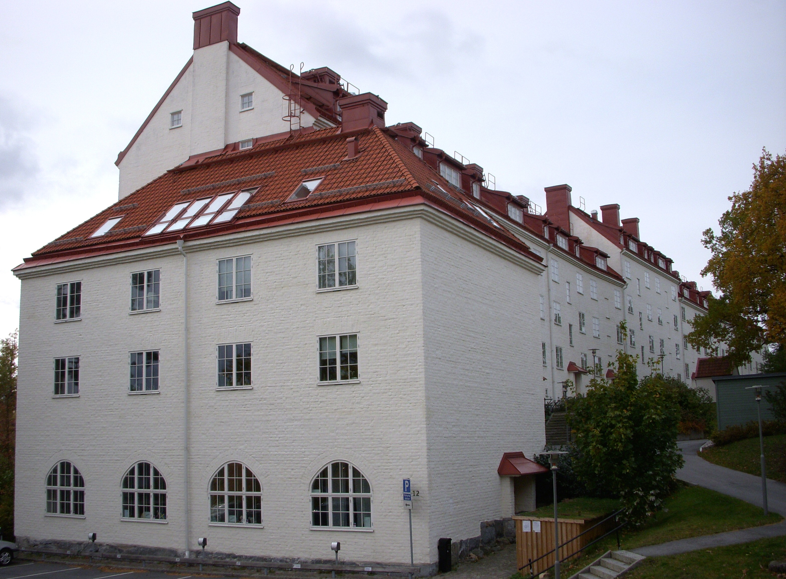 AGA:s bostadshus från 1914 vid Bergsätravägen på Lidingö